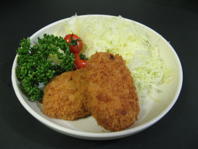 Korokke